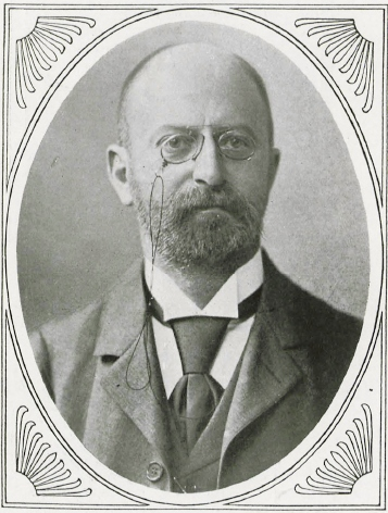 Edmund Lesser (1852-1918), deutscher Dermatologe.